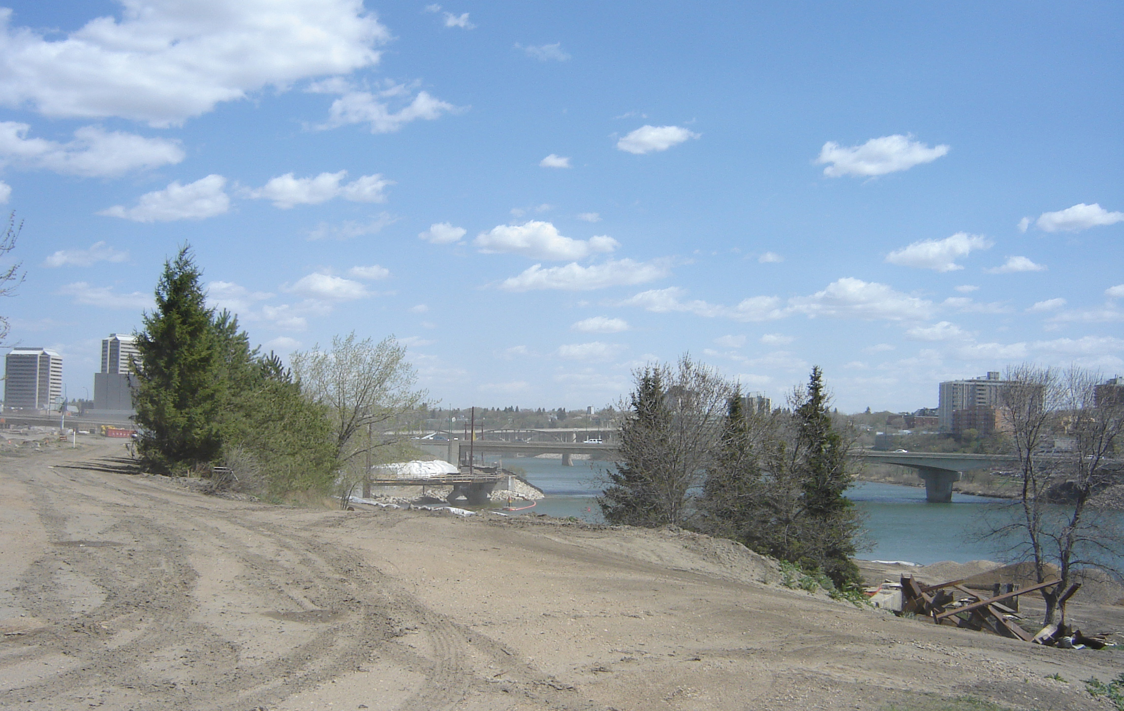 River Landing Saskatoon